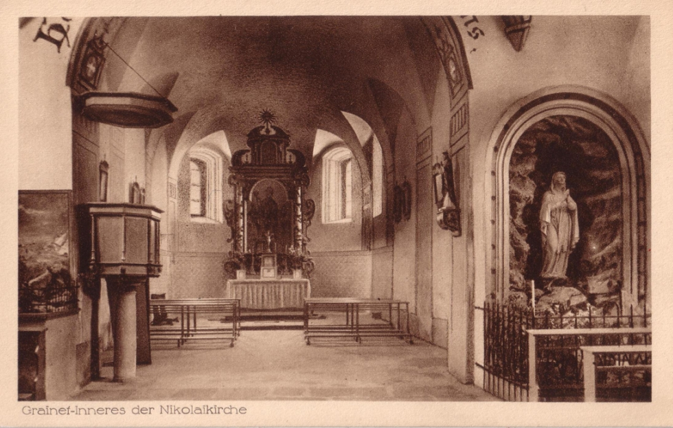 Postkarte Grainet, Inneres der Nikolauskirche